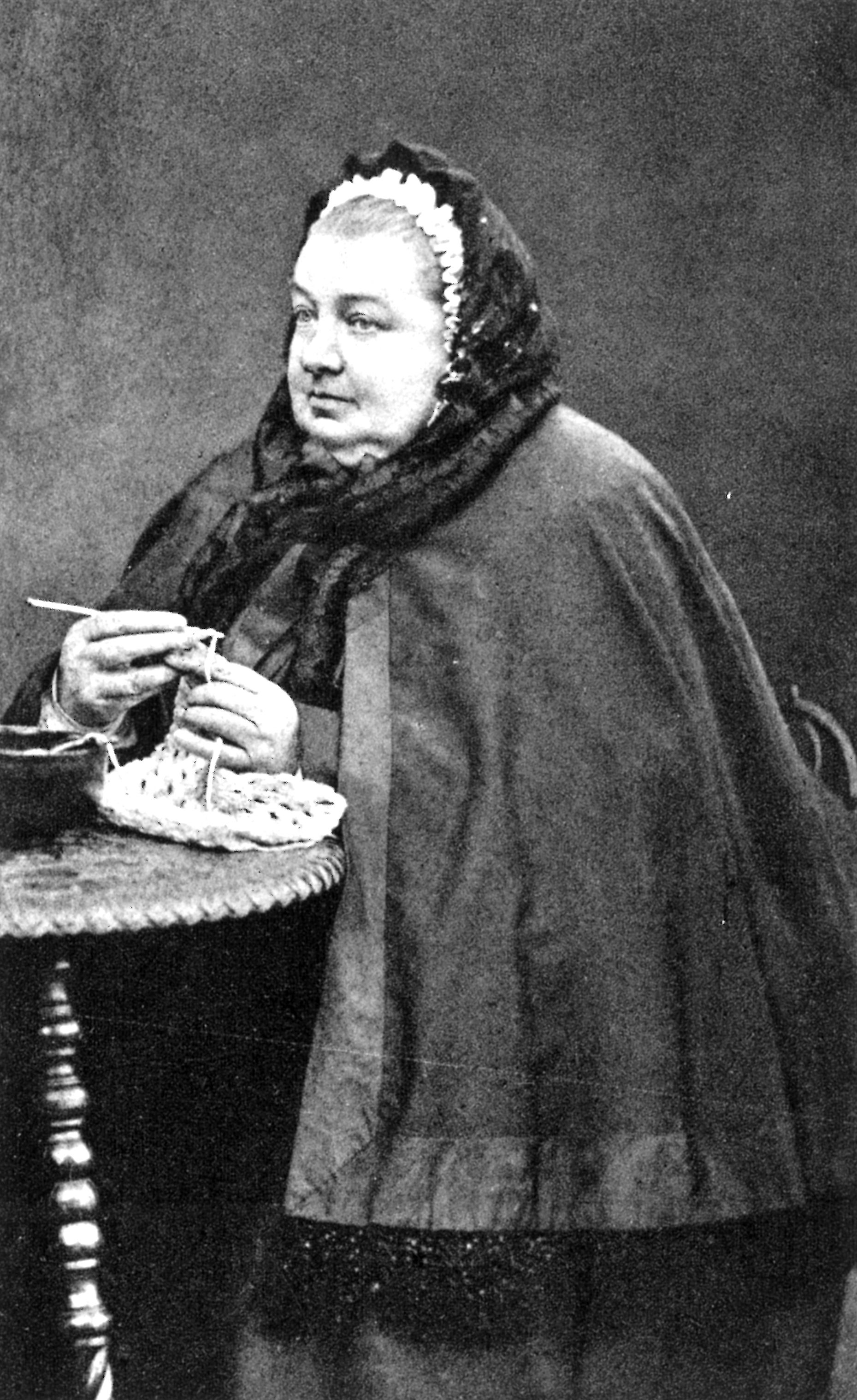 Fotografie von Katharina zu Hohenlohe-Waldenburg-Schillingsfürst (verheiratete Fürstin von Hohenzollern-Sigmaringen) (1817-1893)